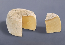 Queso Los Beyos